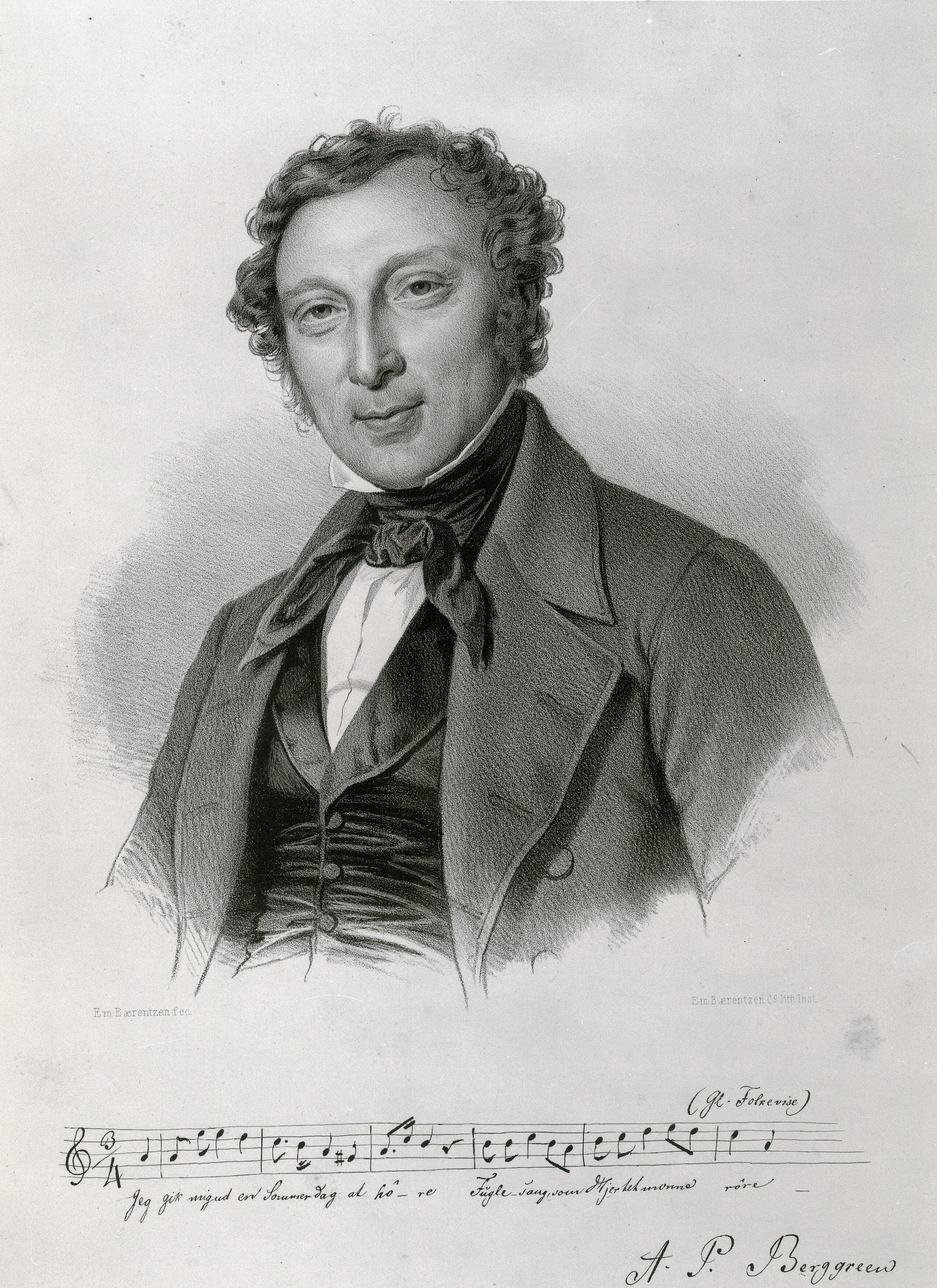 Andreas Peter Berggreen (2. marts 1801 - 8. november 1880) var en dansk komponist, og musikalsk forfatter.